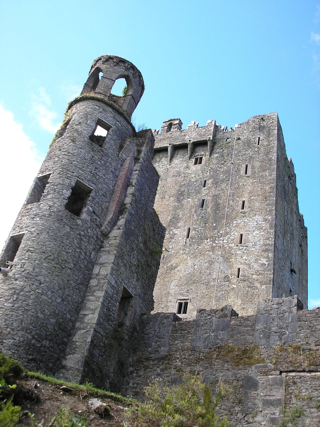 Taken by Valdoria august 2006.